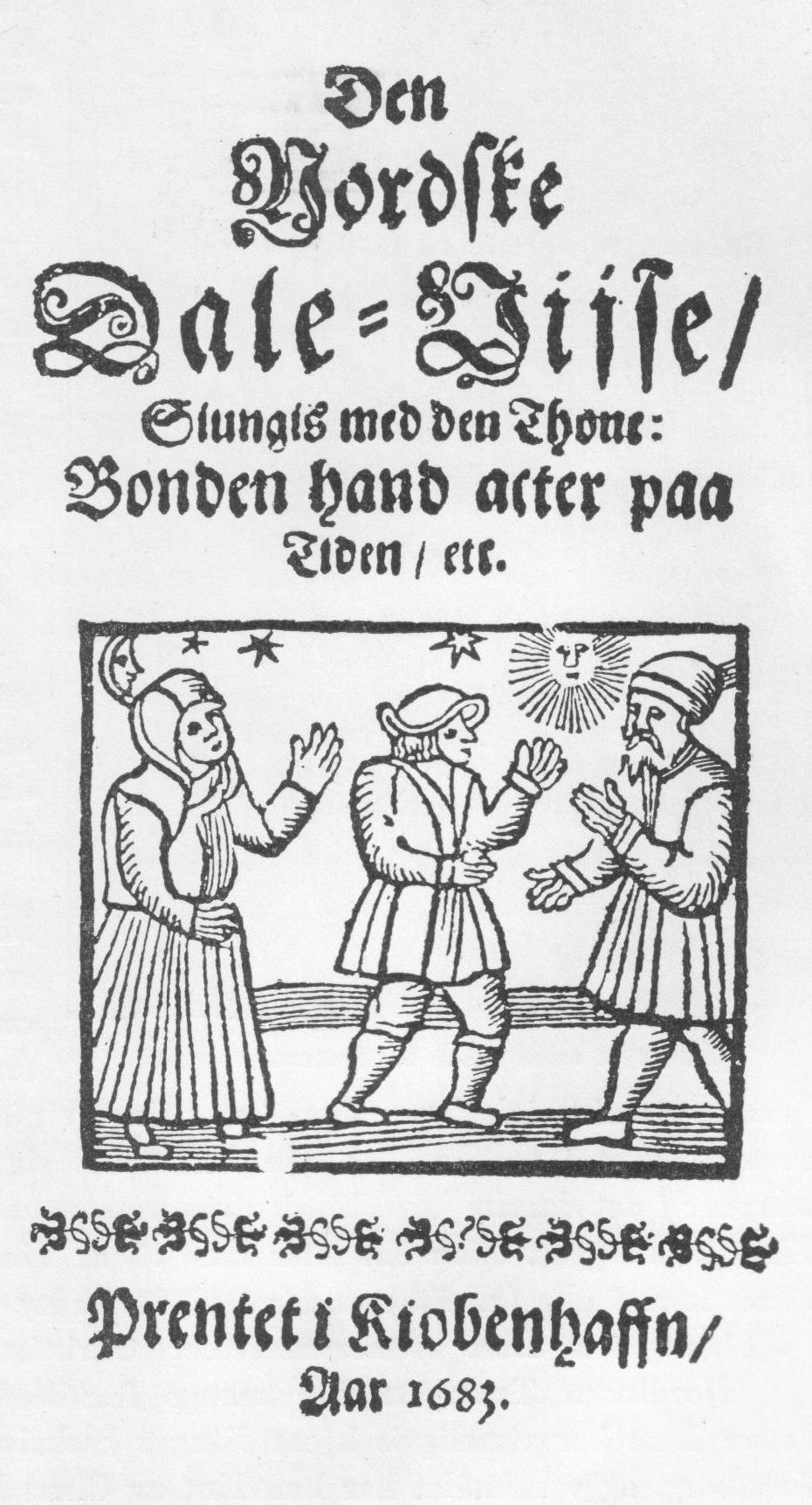 Faksimile av tittelblad på førsteutgåva av Dalevisa, etter Norsk Litteraturhistorie, Gyldendal 1935.